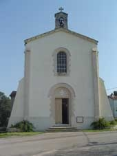 Eglise Du Pradel